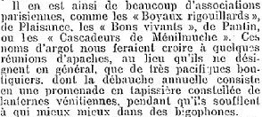 Propos sur des sociétés bigophoniques